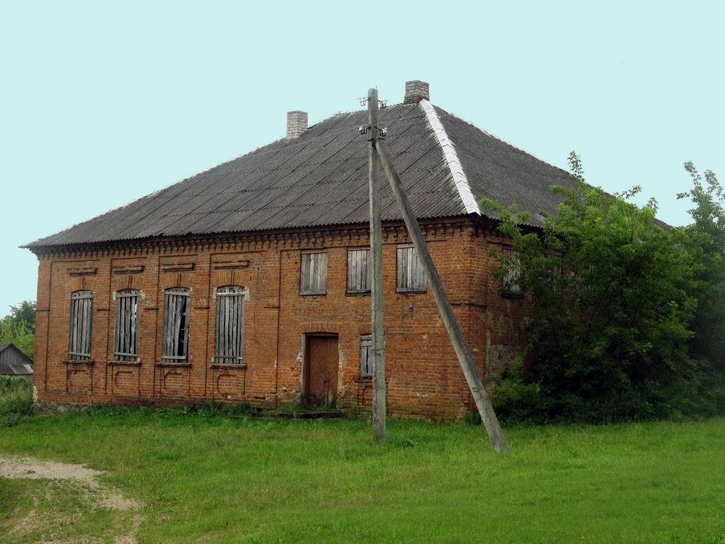 Беларуская (тарашкевіца): Астрына